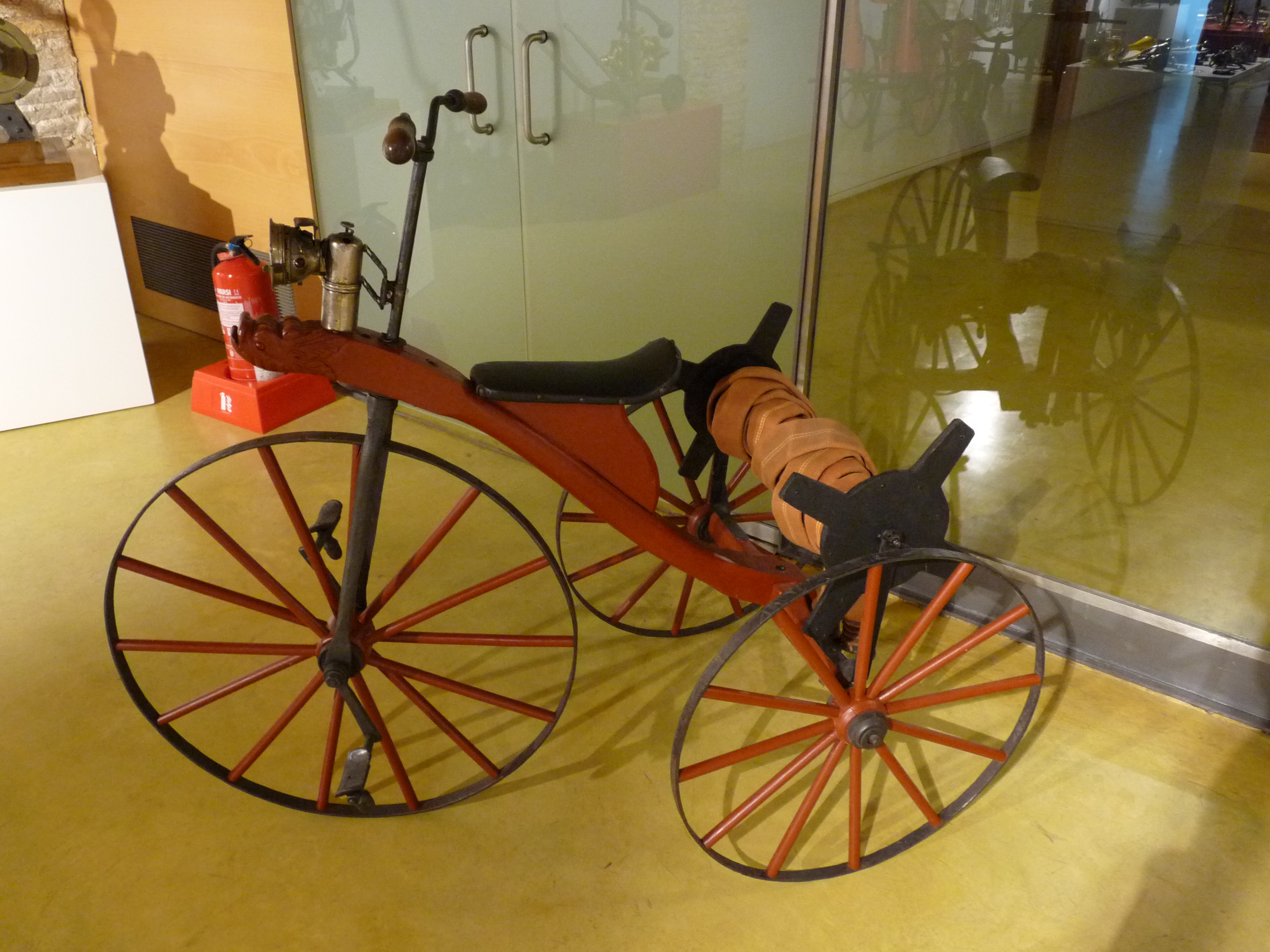 Zaragoza - Museo Bomberos - Triciclo artesanal con ruedas metálicas de 1885. Se ha adaptado una devanadera portamangueras para incendios. Origen: Francia